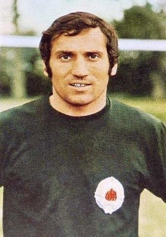 Marcel Aubour en 1970, 'Ageducatifs Football 1970 - 1971', Panini figurina n°211.